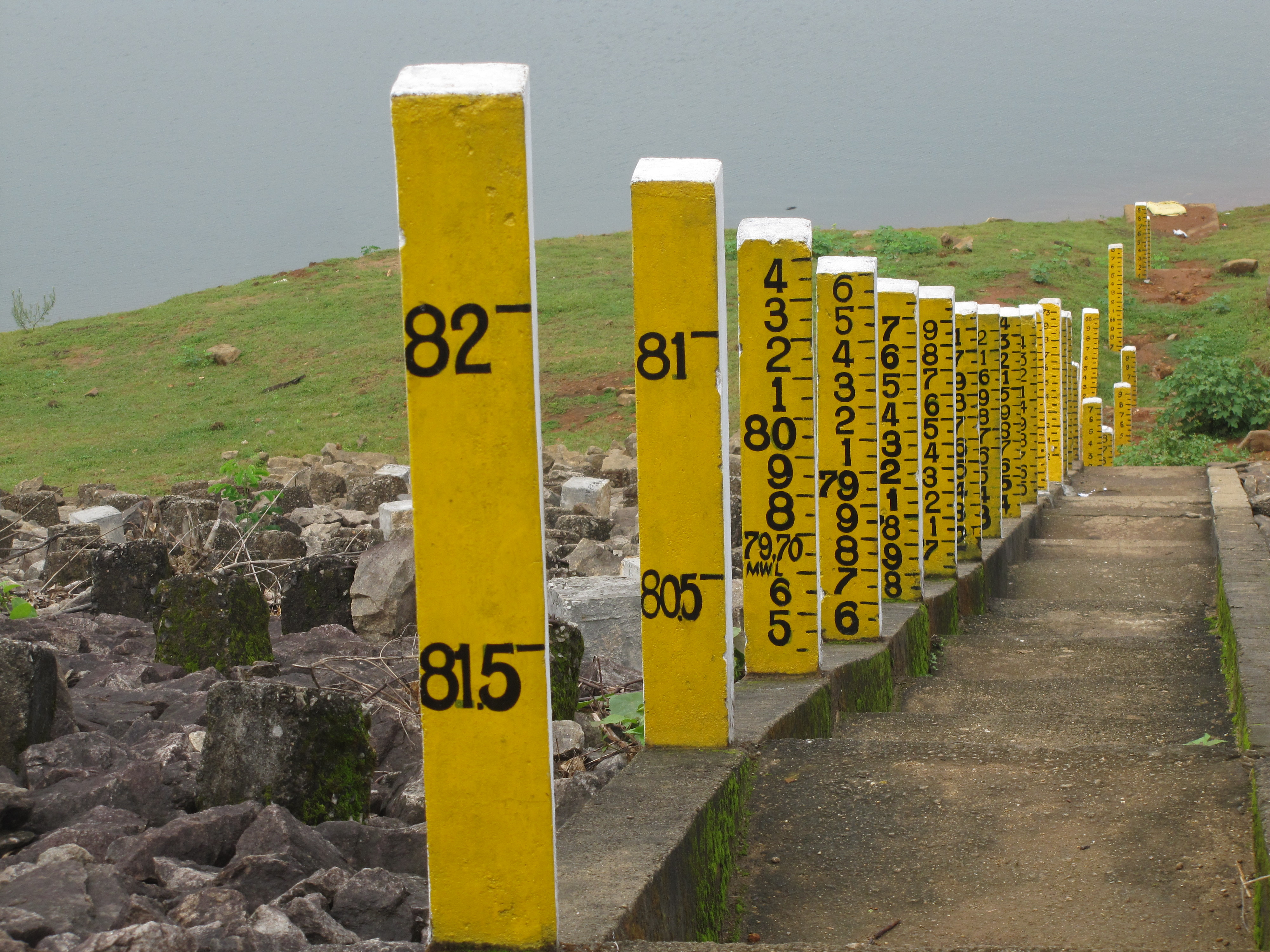 ചിമ്മിനി